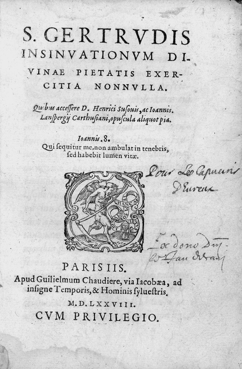 Gertrude von Helfta: Insinuationum divinae pietatis exercitia nonnulla. Quibus accessere D. Henrici Susonis ac Joannis Lanspergii ..., Titelblatt, Paris, Guilllaume Chaudière, 1578